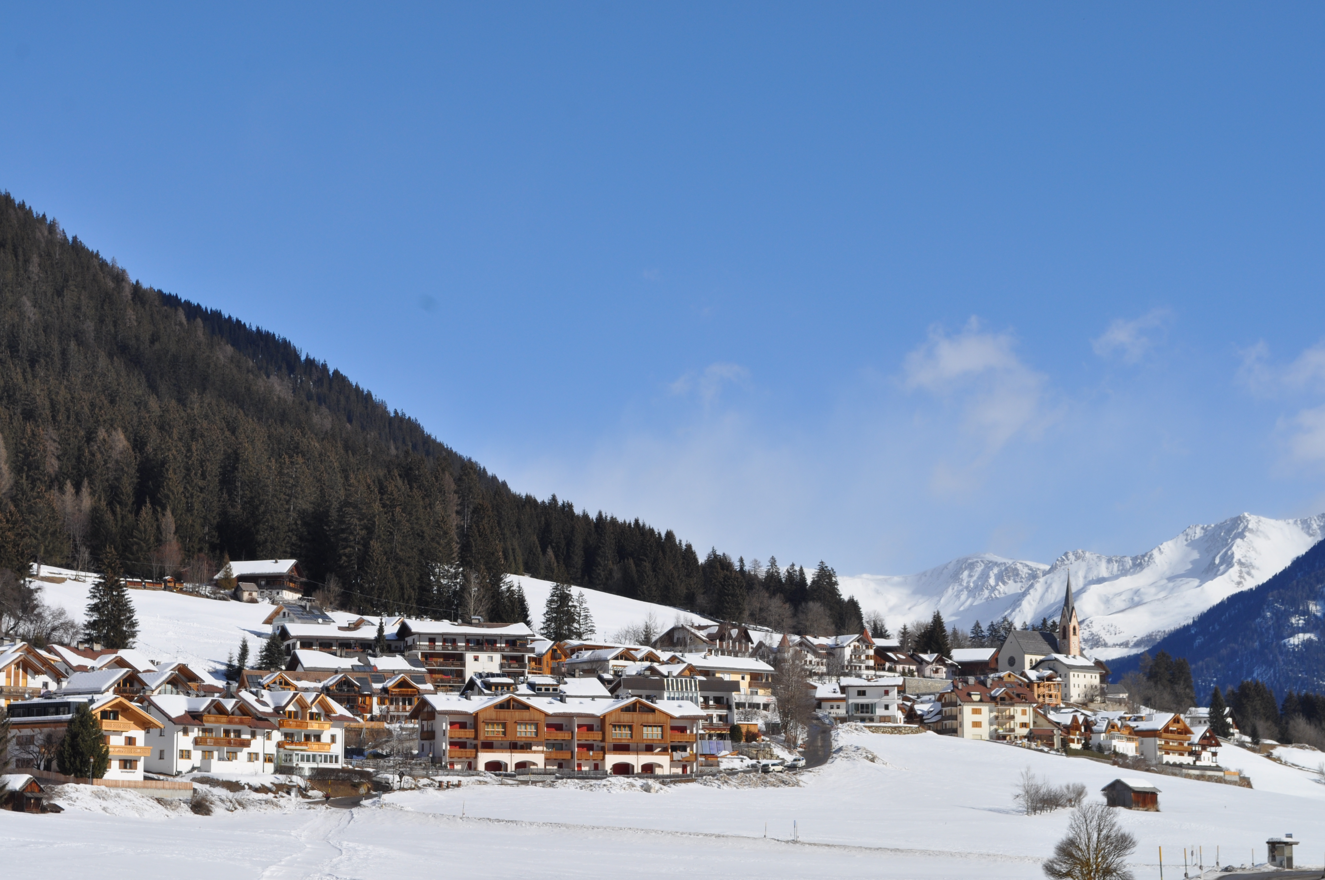 Pichl, Ortsteil von Gsies